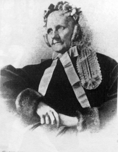 Adèle Ricard vers 1899